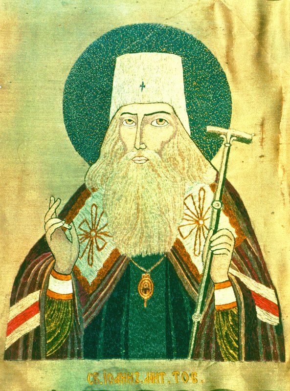 Свт. Иоанн (Максимович). Шитая икона. Ок. 1916 г. До нач. 20-х гг. XX в. находилась в Тобольске, совр. местонахождение неизвестно